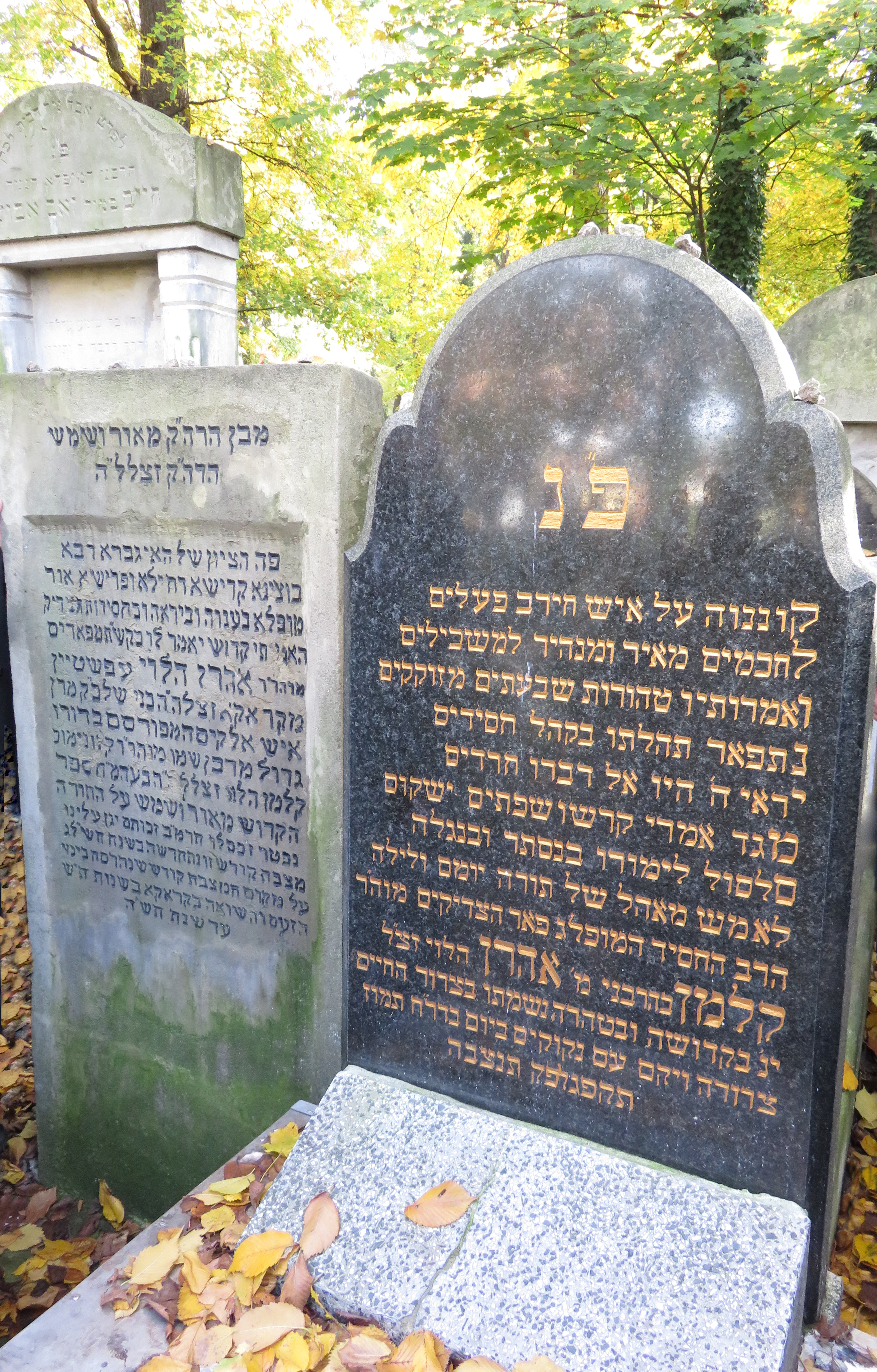 מצבת המאור ושמש ובנו. קרקוב.jpg